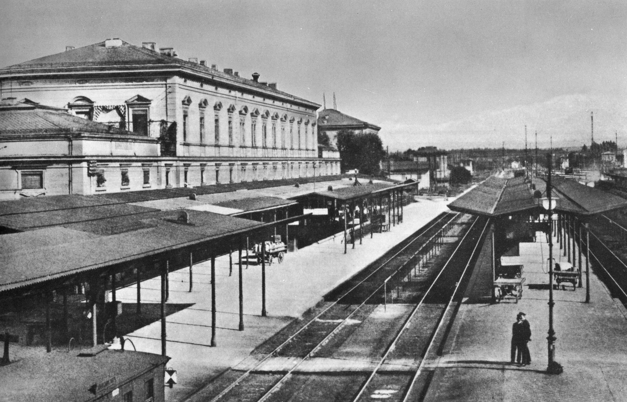 Ansicht des Bahnhofs Rosenheim